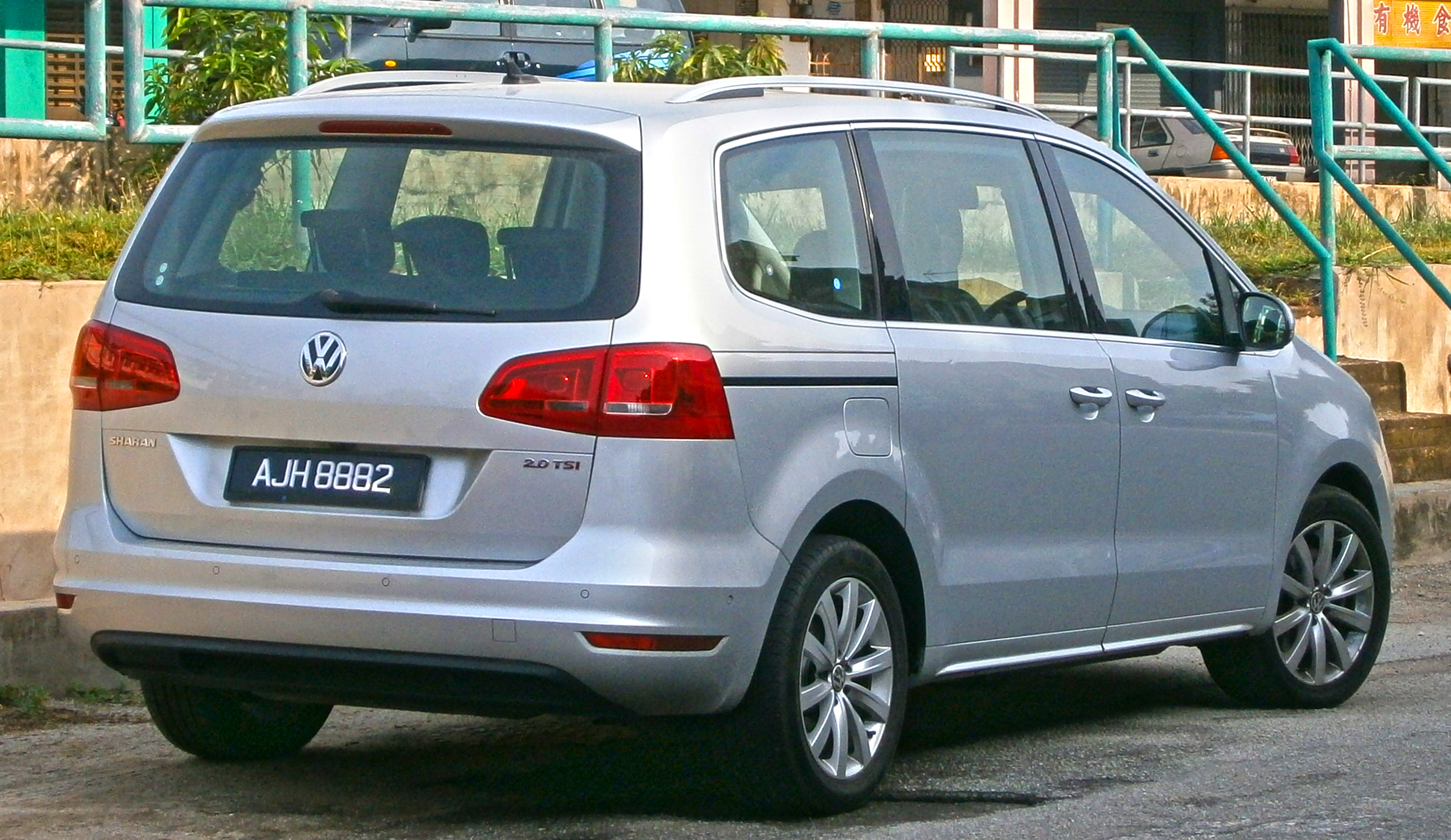 2013 Volkswagen Sharan 2.0 TSI 5-door MPV